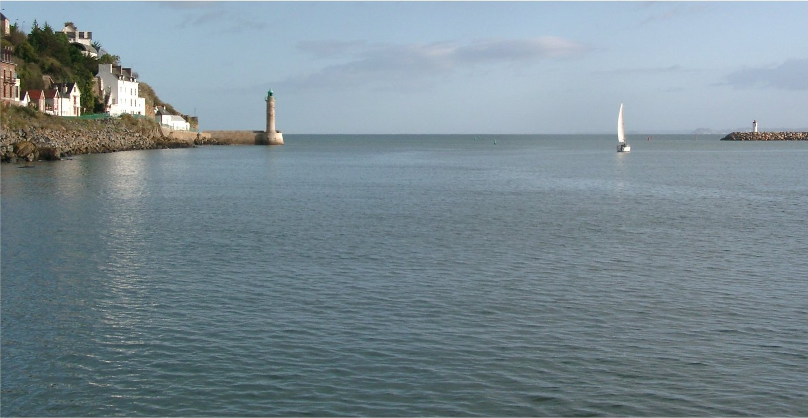 Sortie du Légué à marée haute en baie de Saint-Brieuc (Côtes d'Armor)